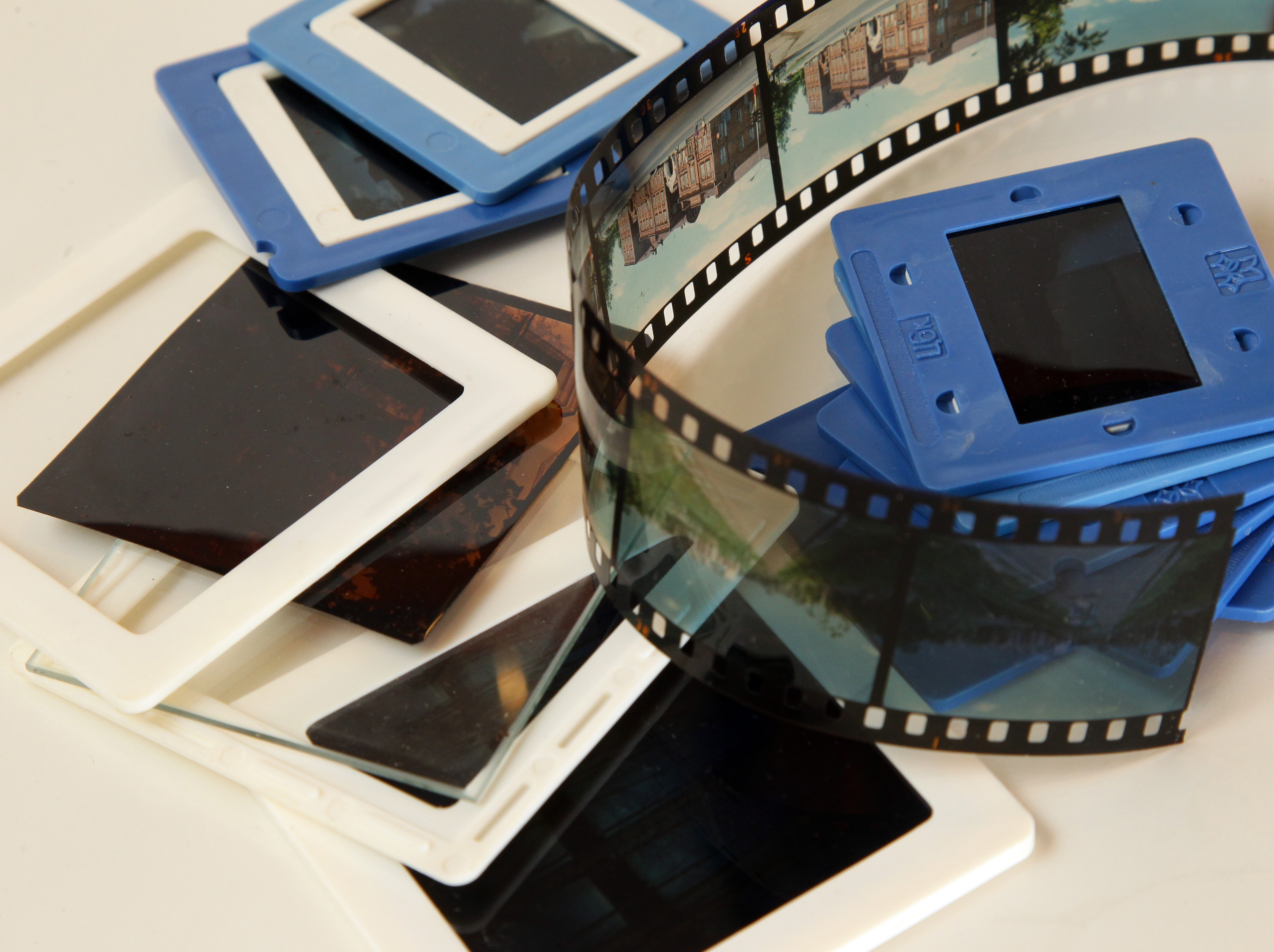 35-mm and 6x6 cm slide frames